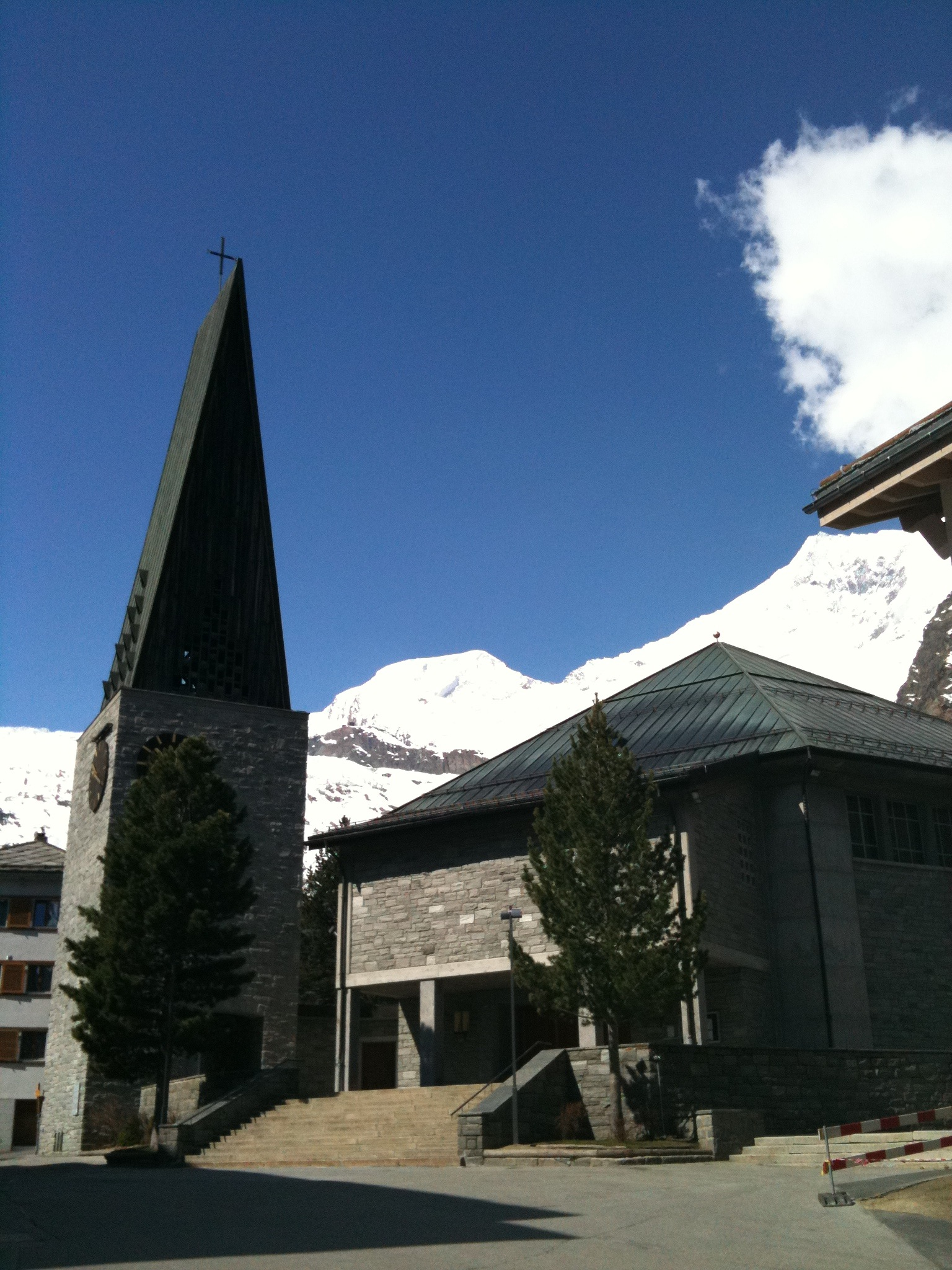 Herz Jesu - Kirche in Saas-Fee, Kanton Wallis